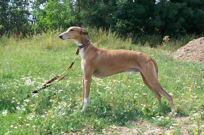 Chart Polski "Cekin Erinnerungen" (Pewniak Res Polona x Harenda Celerrimus) Breeder: Francuz/Zelazny Autor: Pia Demant Quelle-URL: Pia Demant Lizenz: Pia Demant